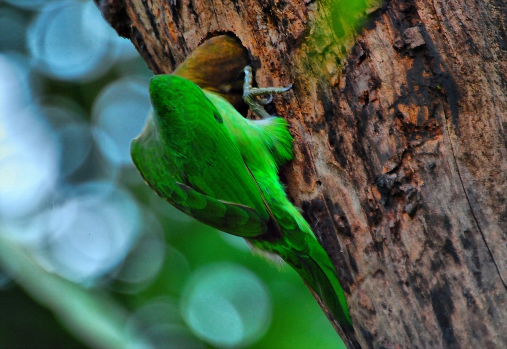 ചിന്നക്കുട്ടുറുവൻ- കൂടുണ്ടാക്കുന്നു